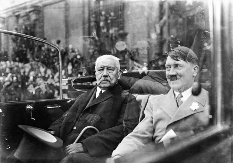 Die große Feier des 1. Mai des Tages der Nationalen Arbeit im Lustgarten in Berlin! Reichspräsident von Hindenburg und Reichskanzler Adolf Hitler begeben sich im Auto zur Feier der Nationalen Arbeit in den Lustgarten. 1933